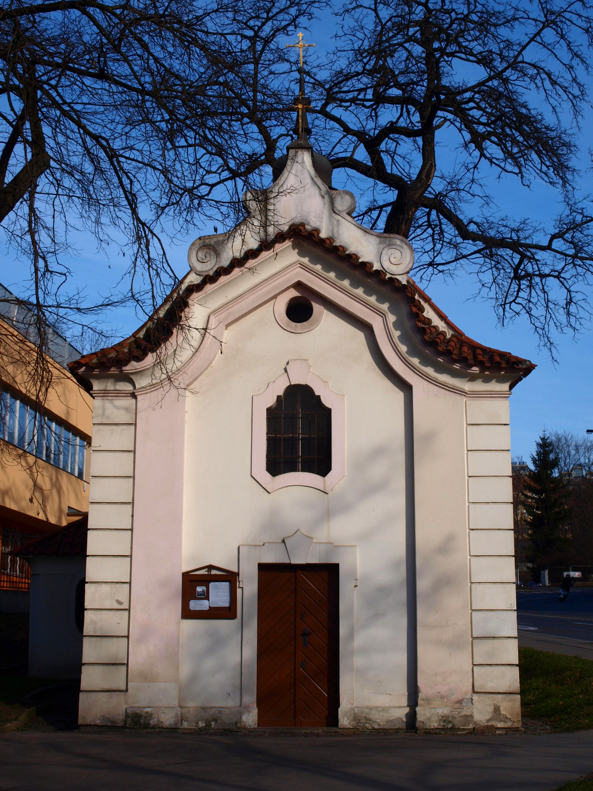 Smíchov, kaple Nanebevzetí Panny Marie